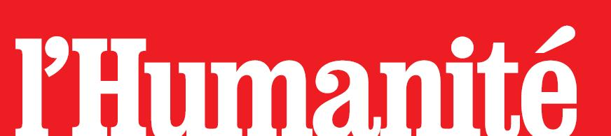 logo du quotidien l'humanité